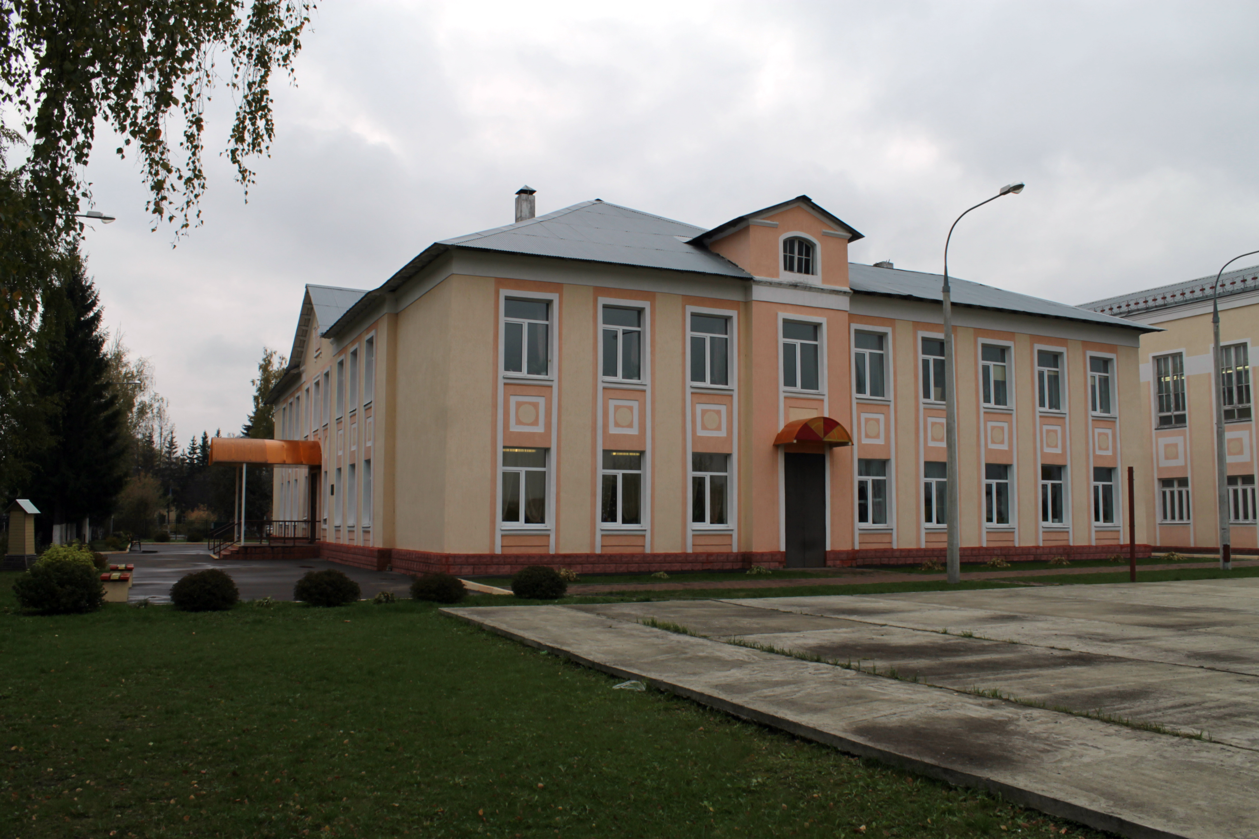 Изображение школы Жилёво